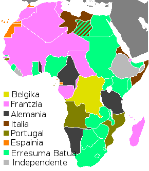 Afrika koloniala 1914an.